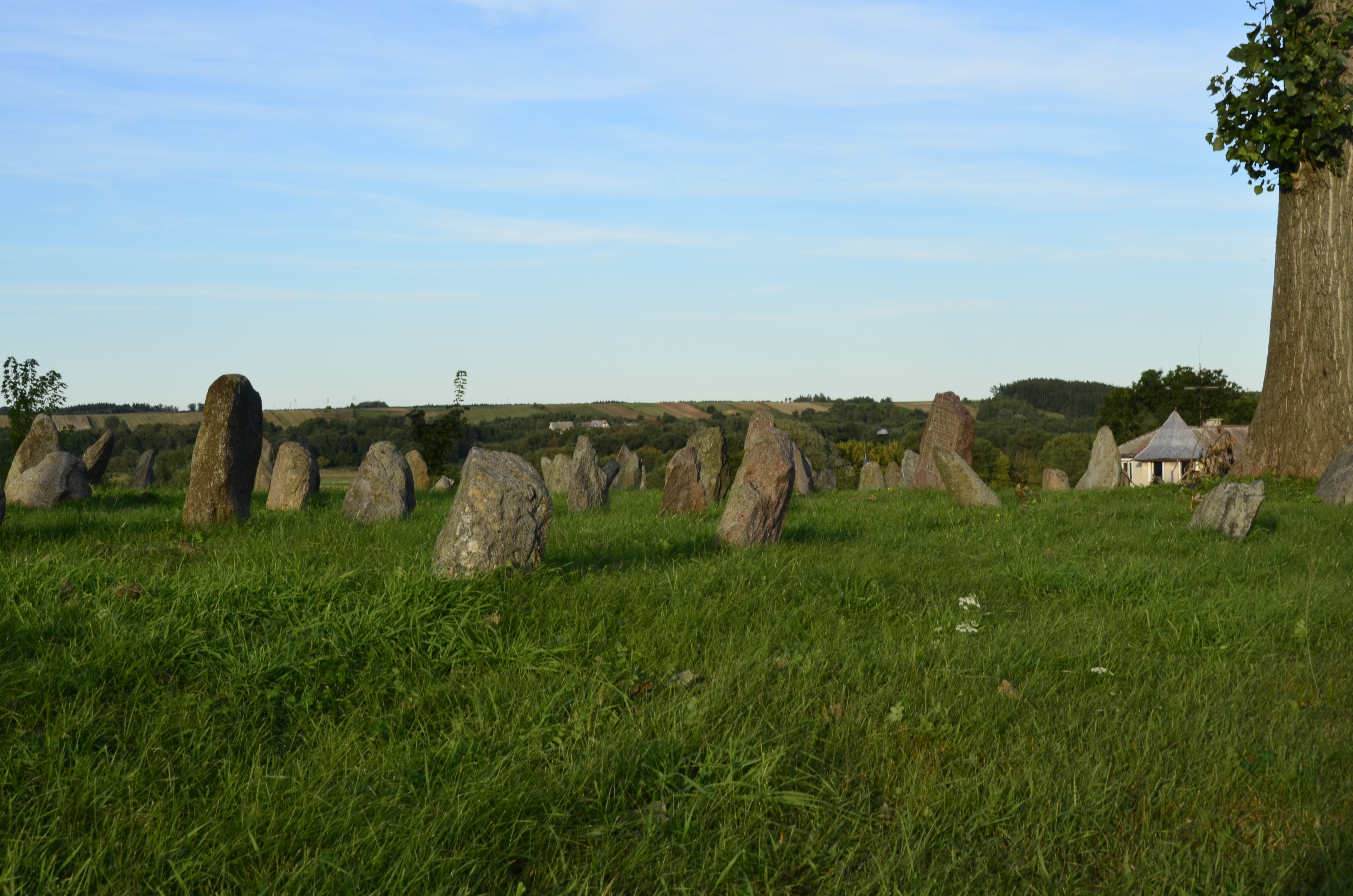 Cmentarz żydowski „stary” Łomża ul. Woziwodzka - Rybaki - pl. Zielony, Łomża